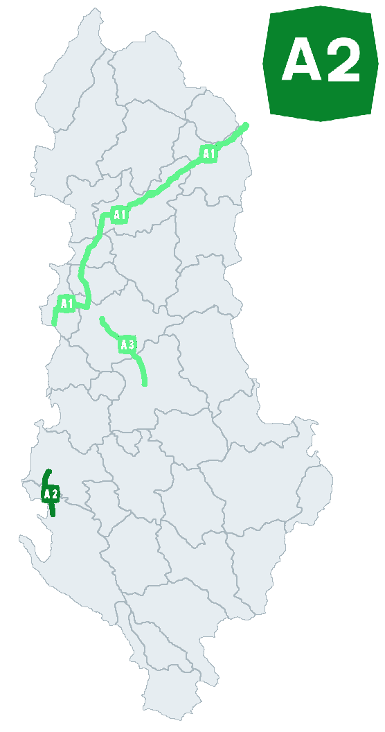 نقشه آزادراه در آلبانی